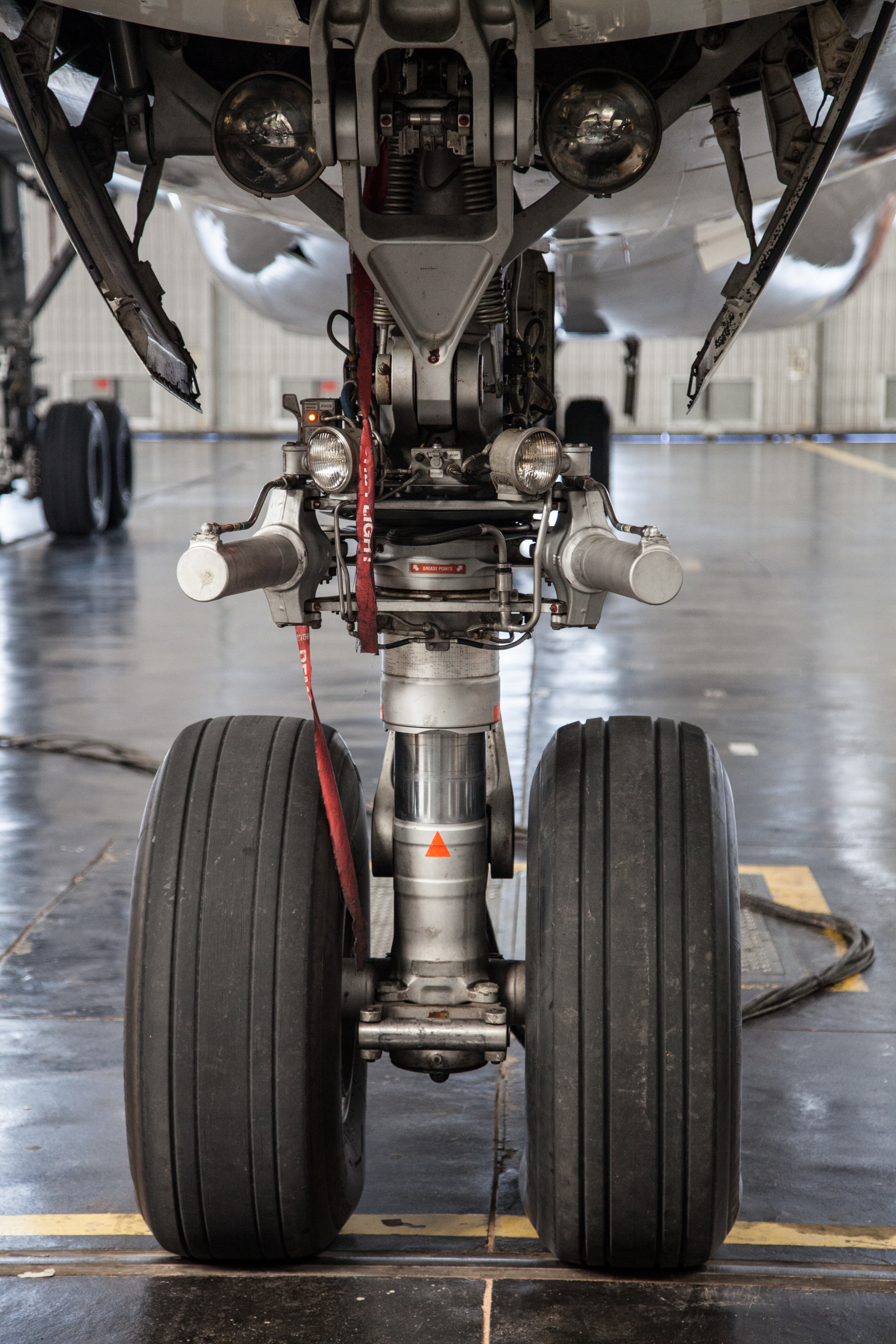 Iberia, La Muñoza-Madrid